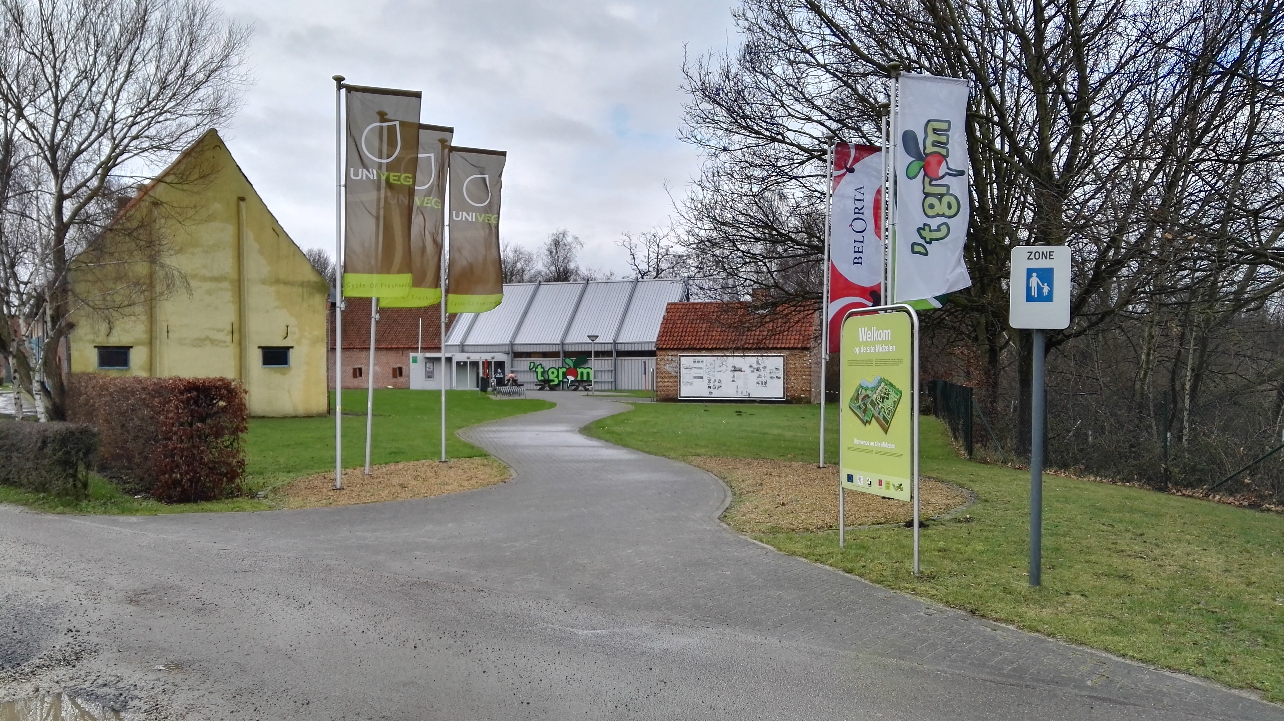 Hoofdgebouw 't Grom